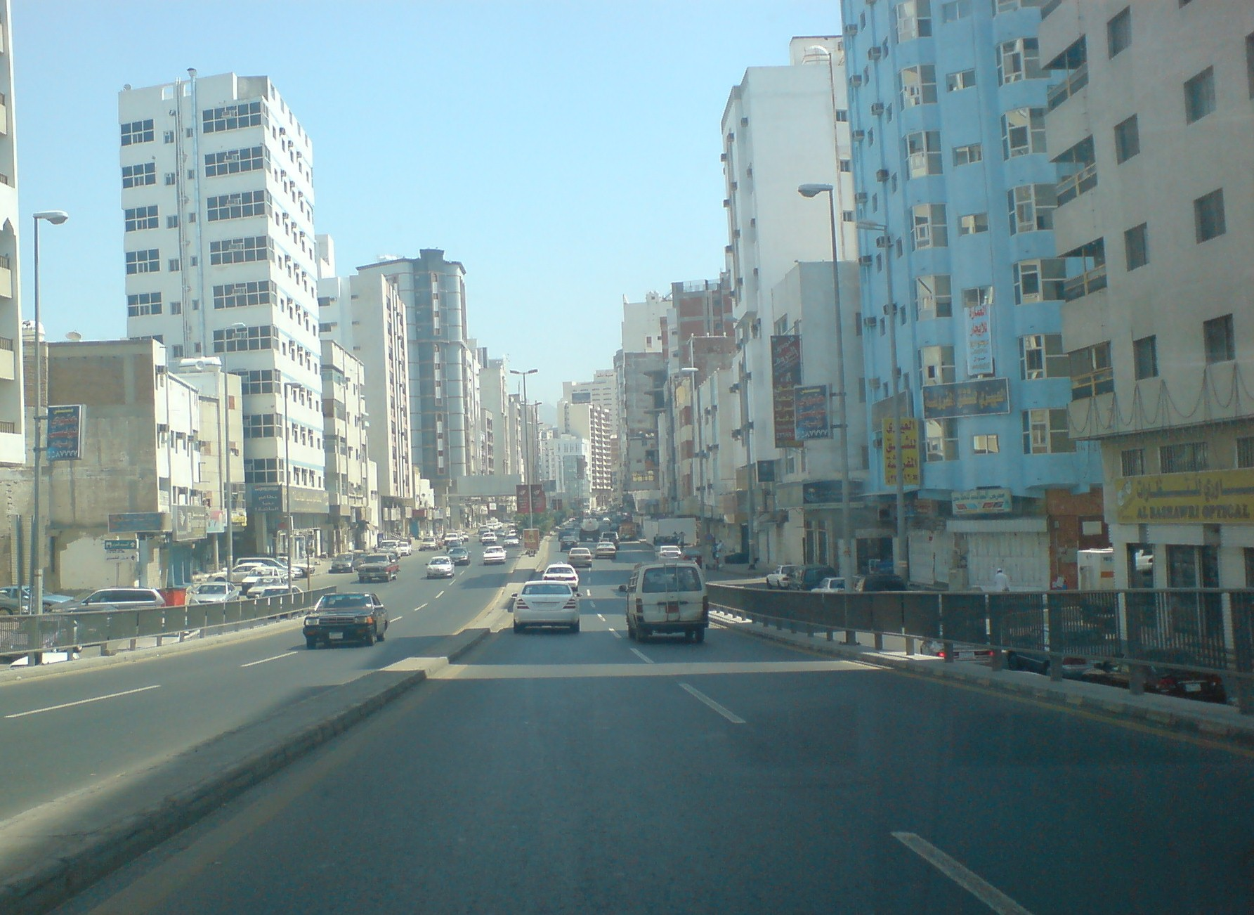 Umm Al Qura Street, Mecca - Saudi Arabia